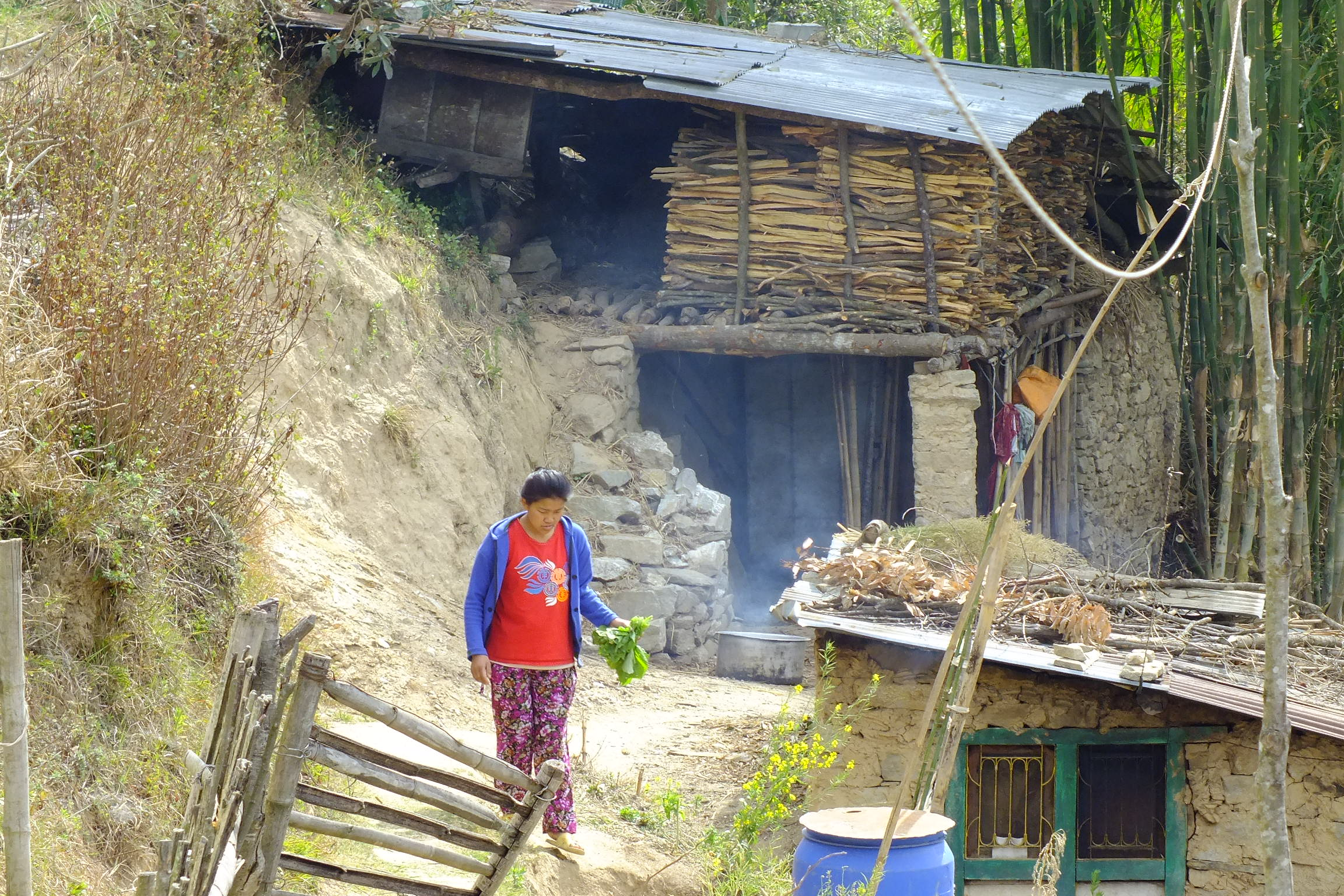 2015-03-18 Nagarkot